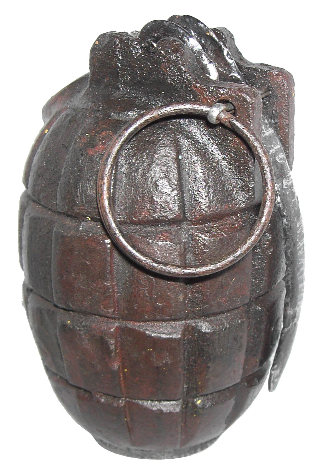 Grenade Mills N°5 Mk I.